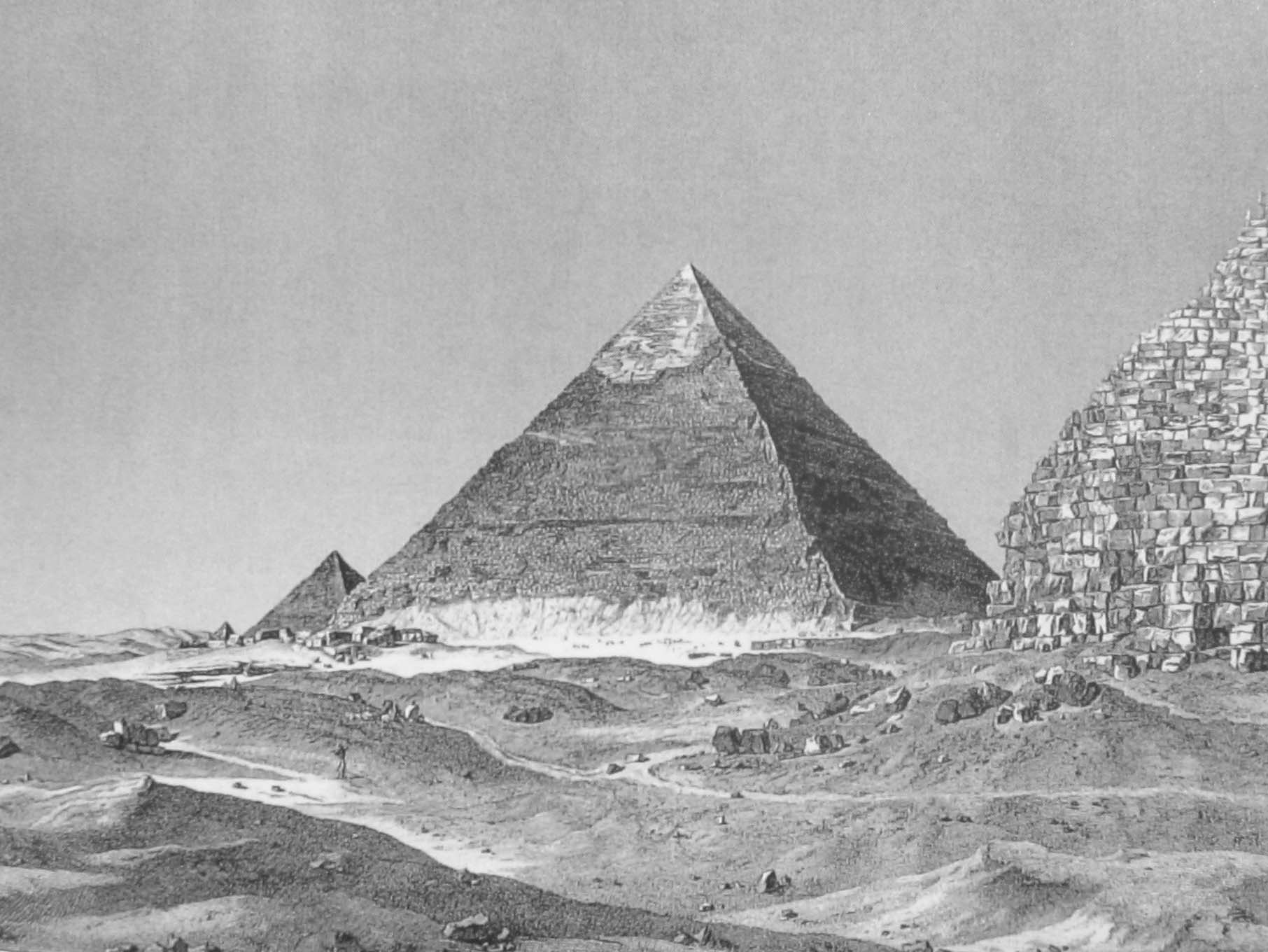 complexe funéraire de Khéphren